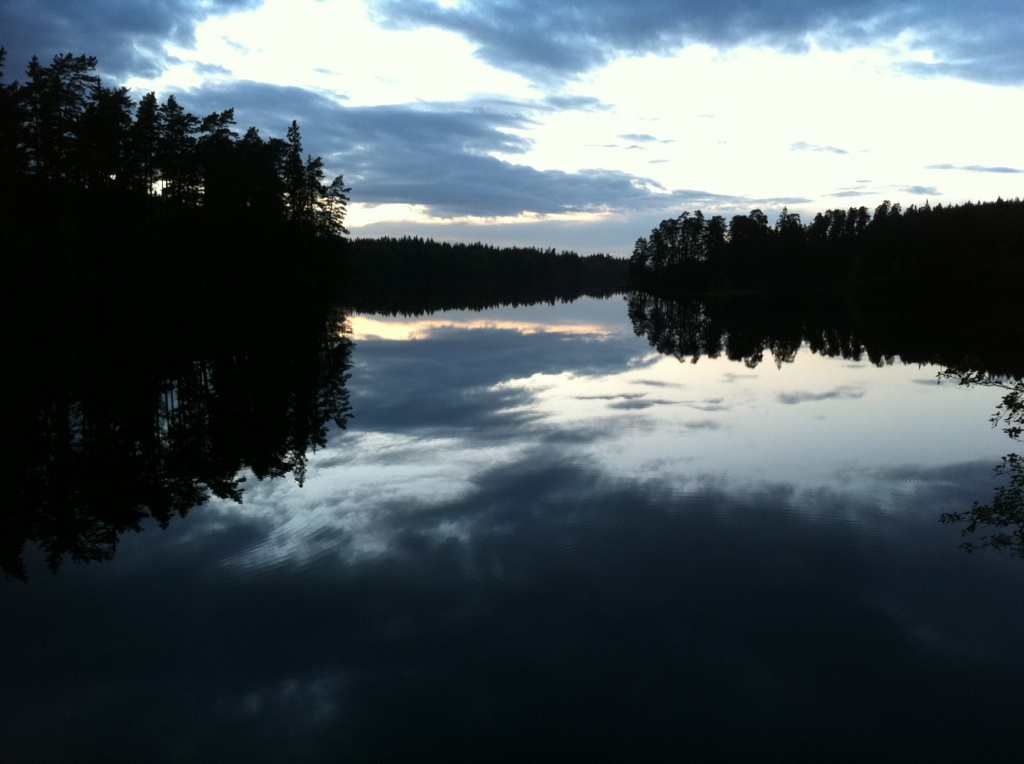 Stråken, Mullsjö